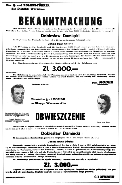 Dowódca SS i POLICJI w Okręgu Warszawskim OBWIESZCZENIE Podejrzany jest o współdziałanie w zbrodni na osobie kierownika Teatru Miasta Warszawy, Karola Juliusza Syma, jest ukrywający się od dnia 7 marca 1941 r. 42-letni aktor Dobiesław Damięcki W towarzystwie Damięckiego przebywa znajdująca się w poważnym stanie aktorkaJanina Irena Górska Wszystkie osoby, które widziały Damięckiego i Górską w dniu 7 marca 1941 r. lub później, wzywane są do niezwłocznego zameldowania o tym w biurze Komendanta Policji Bezpieczeństwa i SD w Okręgu Warszawskim, w Warszawie, Strasse der Polizei (Al. Szucha) 23 lub w jakimkolwiek komisariacie policji. Osoby, udzielające pomocy lub schronienia Damięckiemu i Górskiej po opublikowaniu niniejszego obwieszczenia, będą karane. Ci, którzy dotychczas pomagali Damięckiemu unikną kary, o ile na podstawie tego obwieszczenia udzielą policji niezwłocznie inormacyj. Za informacje prowadzące do ujęcia mordercy, wyznaczono nagrodę w wysokości Zł. 3.000.- Nagroda ta przeznaczona jest wyłącznie dla osób cywilnych. Urzędnikom służby policyjnej i SD prawo do niej nie przysługuje. Wypłata nagrody nastąpi z wykluczeniem drogi prawnej. Warszawa, dnia 13 marca 1941 r. (-) Moder SS-Gruppenführer Rysopis Damięckiego: Damięcki jest średniego wzrostu, twarz ma owalną, niebieskie oczy i kędzierzawe, ciemnoblond włosy. Janina Irena Górska